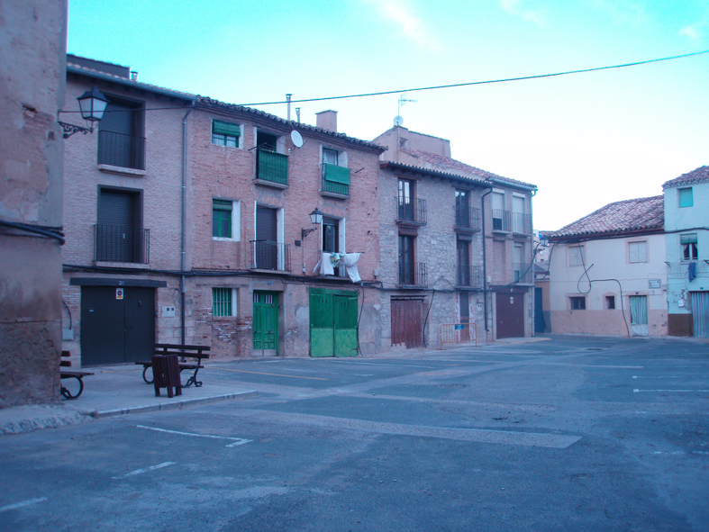 Plaza del Cofrete (Tudela), en 2007